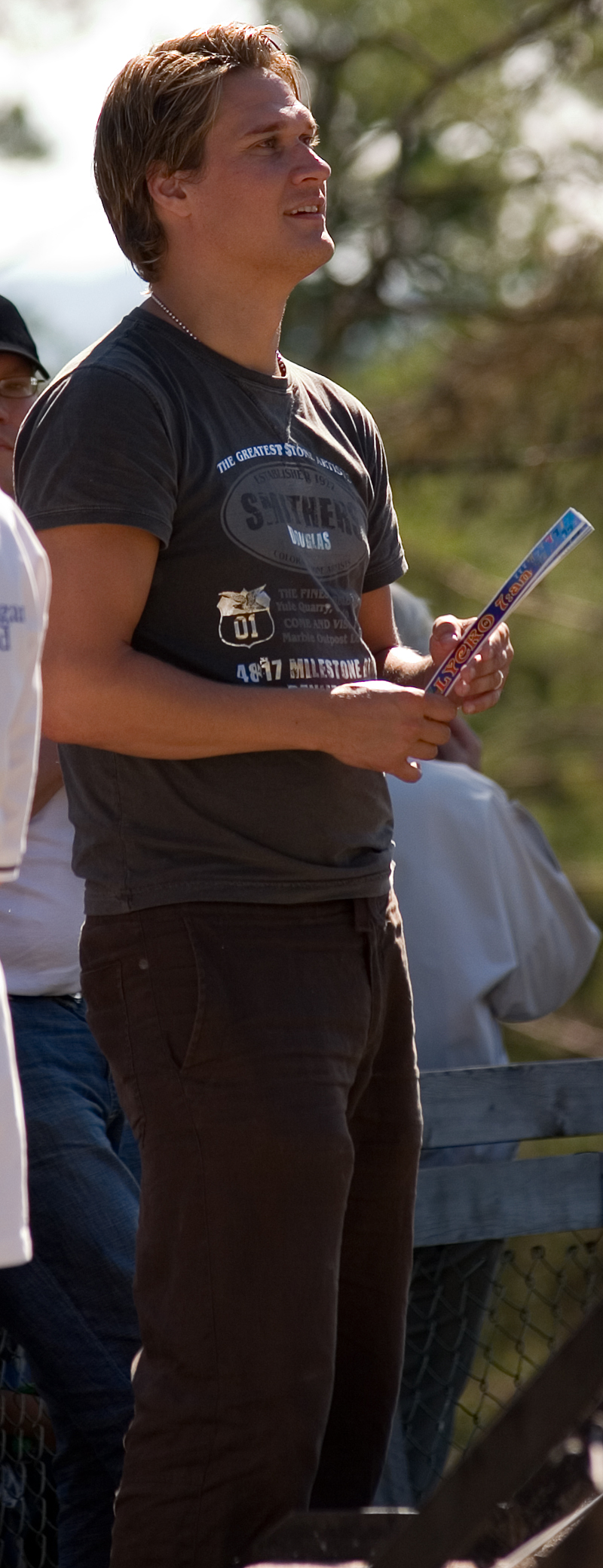 Bengt Dahlqvist, svensk skådespelare och dansare från Nykvarn.